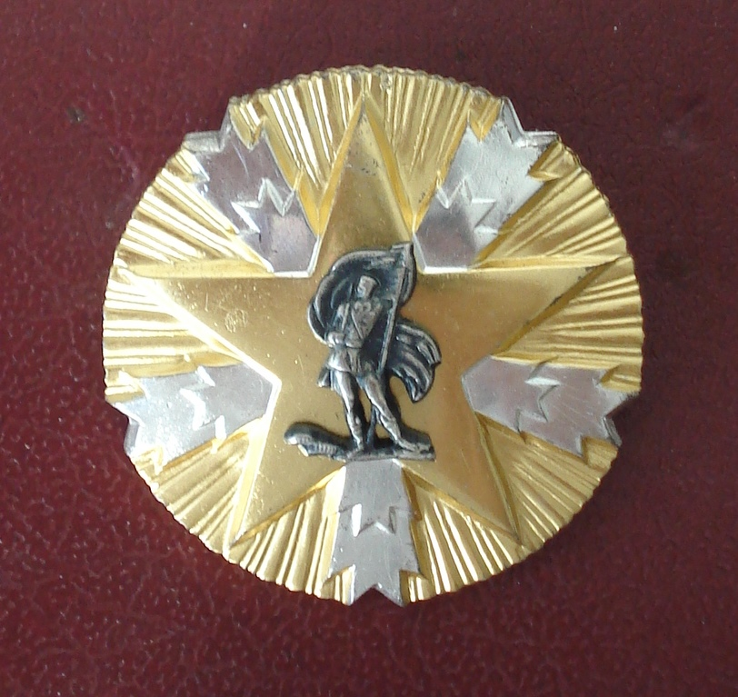 Орден заслуга за народ за народ са златном звездом (првог реда)